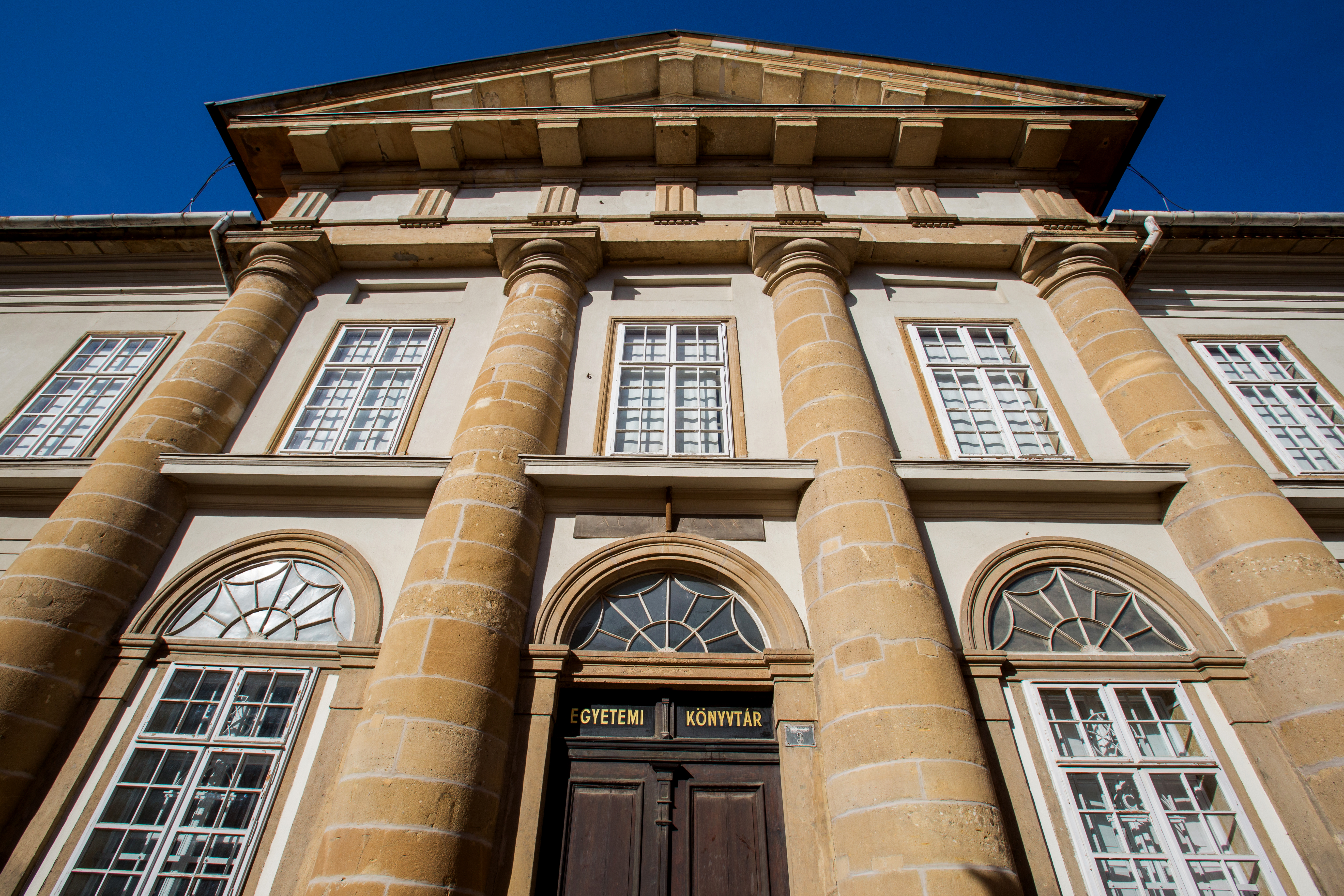 Klimo Könyvtár homlokzata (Pécs)